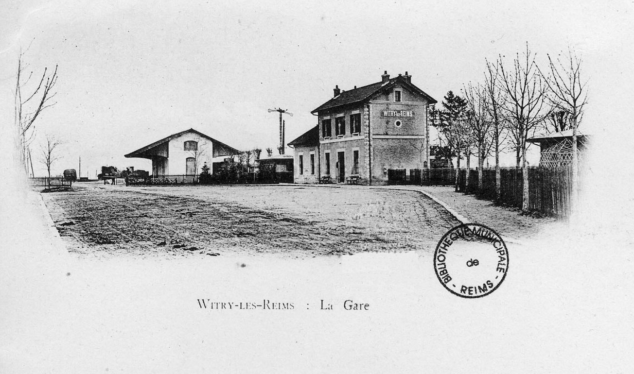 conservé en la B.M. de Reims.